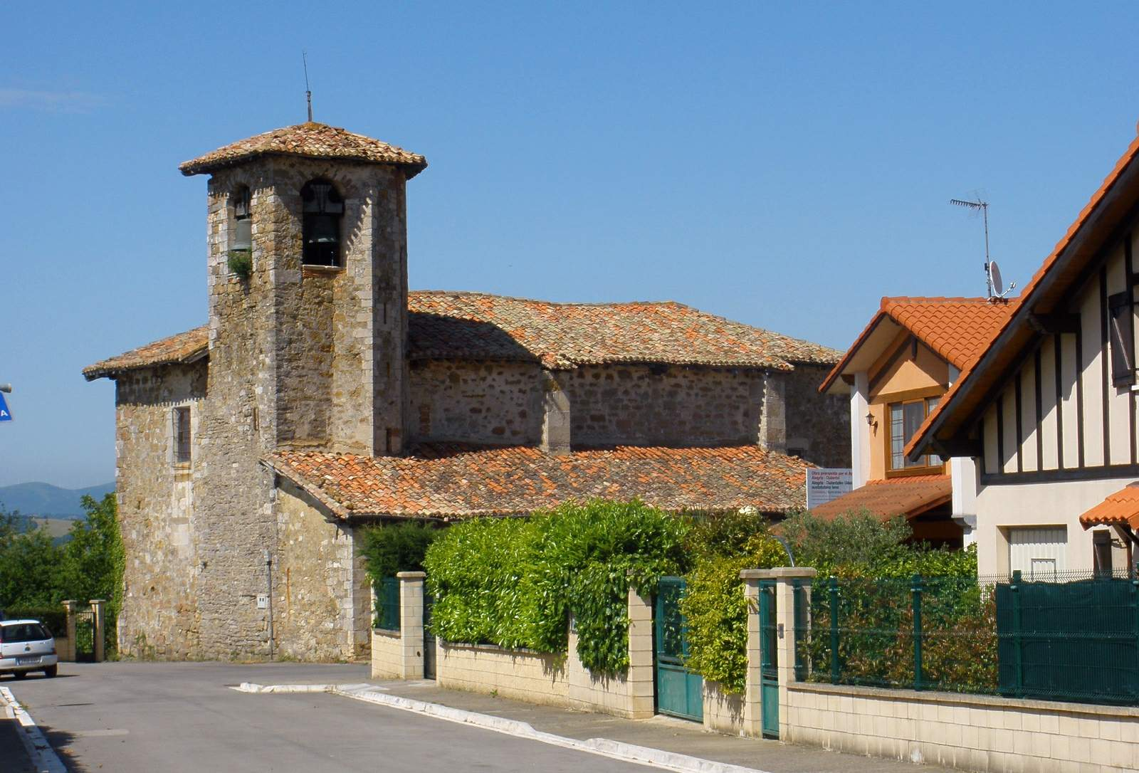 Iglesia de San Román, Egileta (Álava)